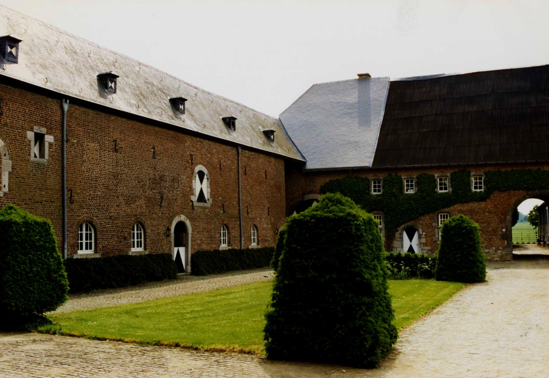 De bouwhoeve aan het binnenplein van kasteel Mheer.